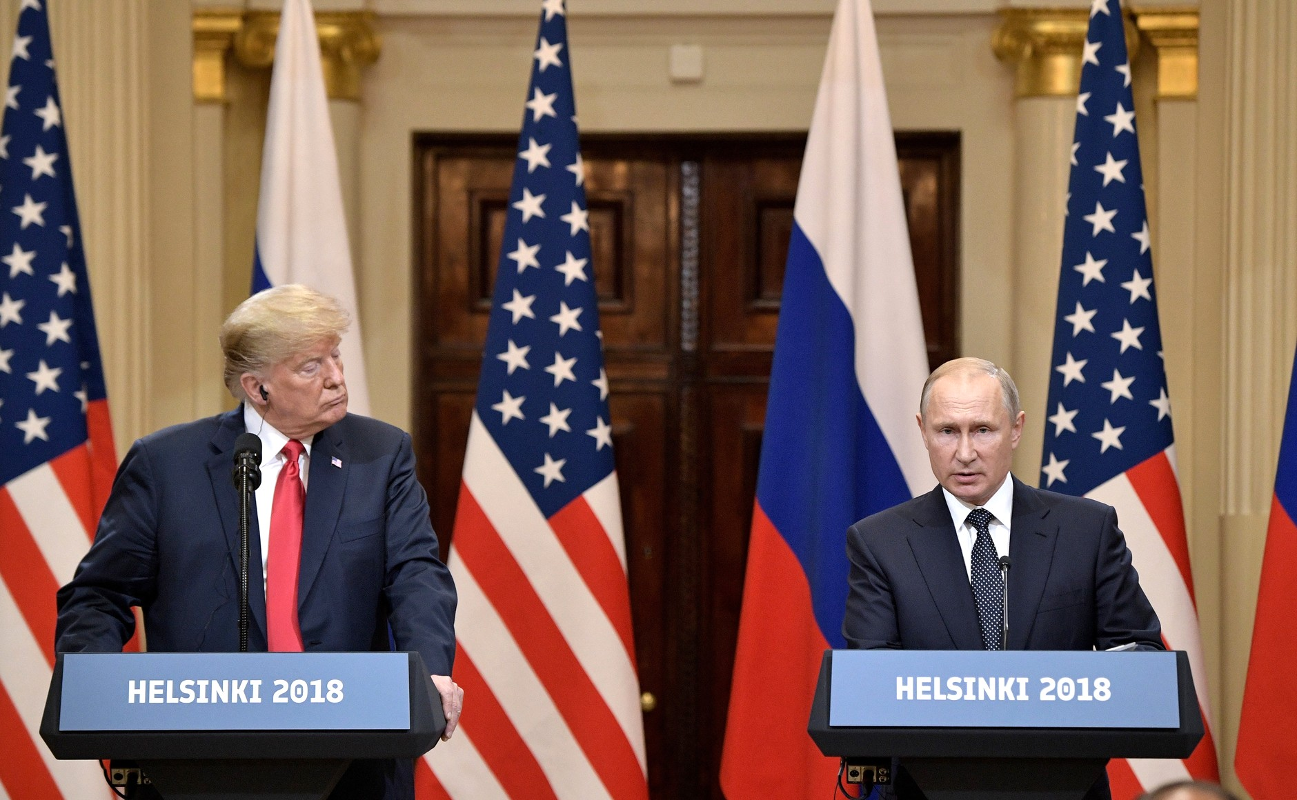 Совместная пресс-конференция Президента России Владимира Путина и Президента Соединённых Штатов Америки Дональда Трампа.